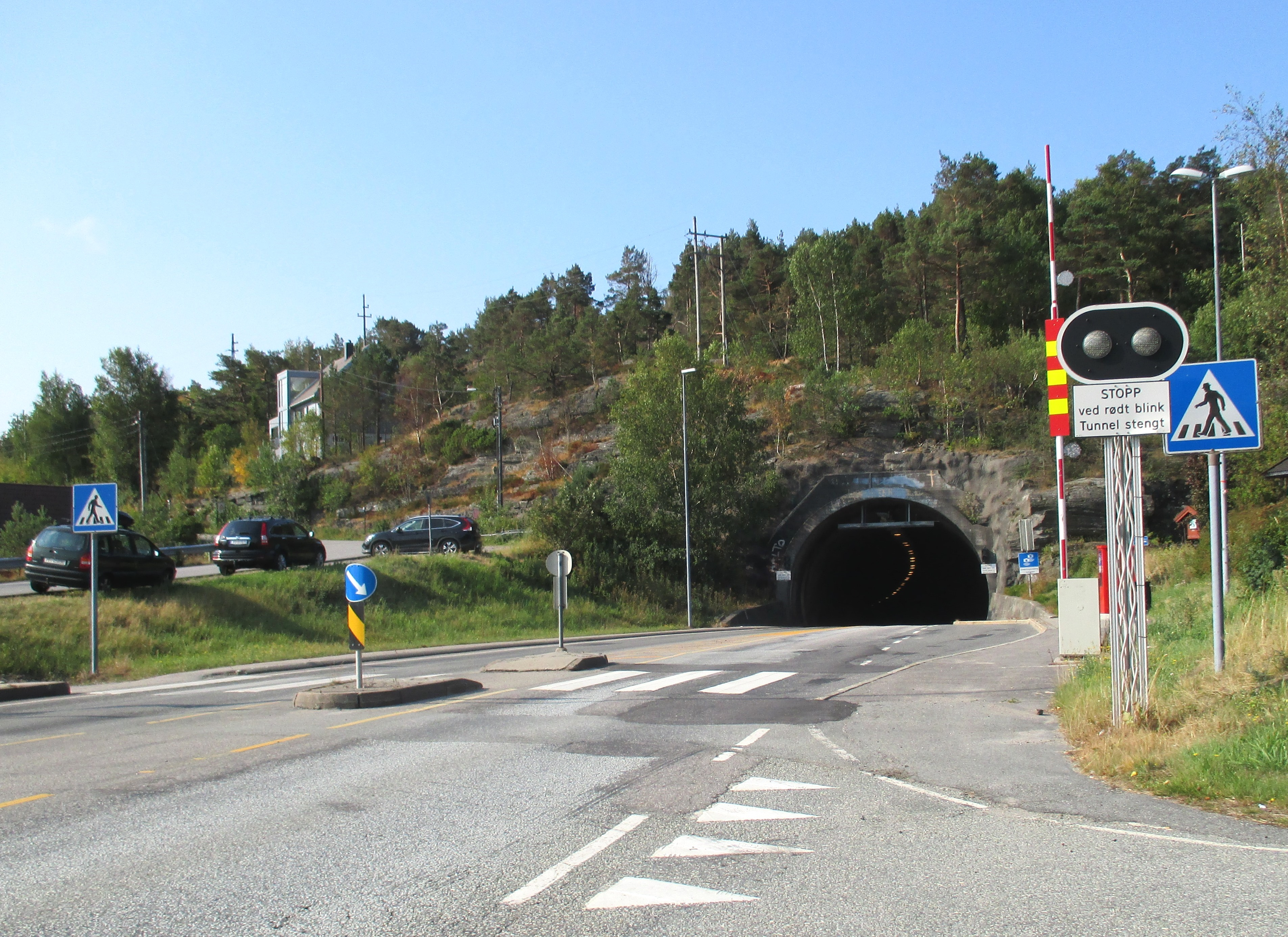 Flekkerøytunnelen fra landsiden